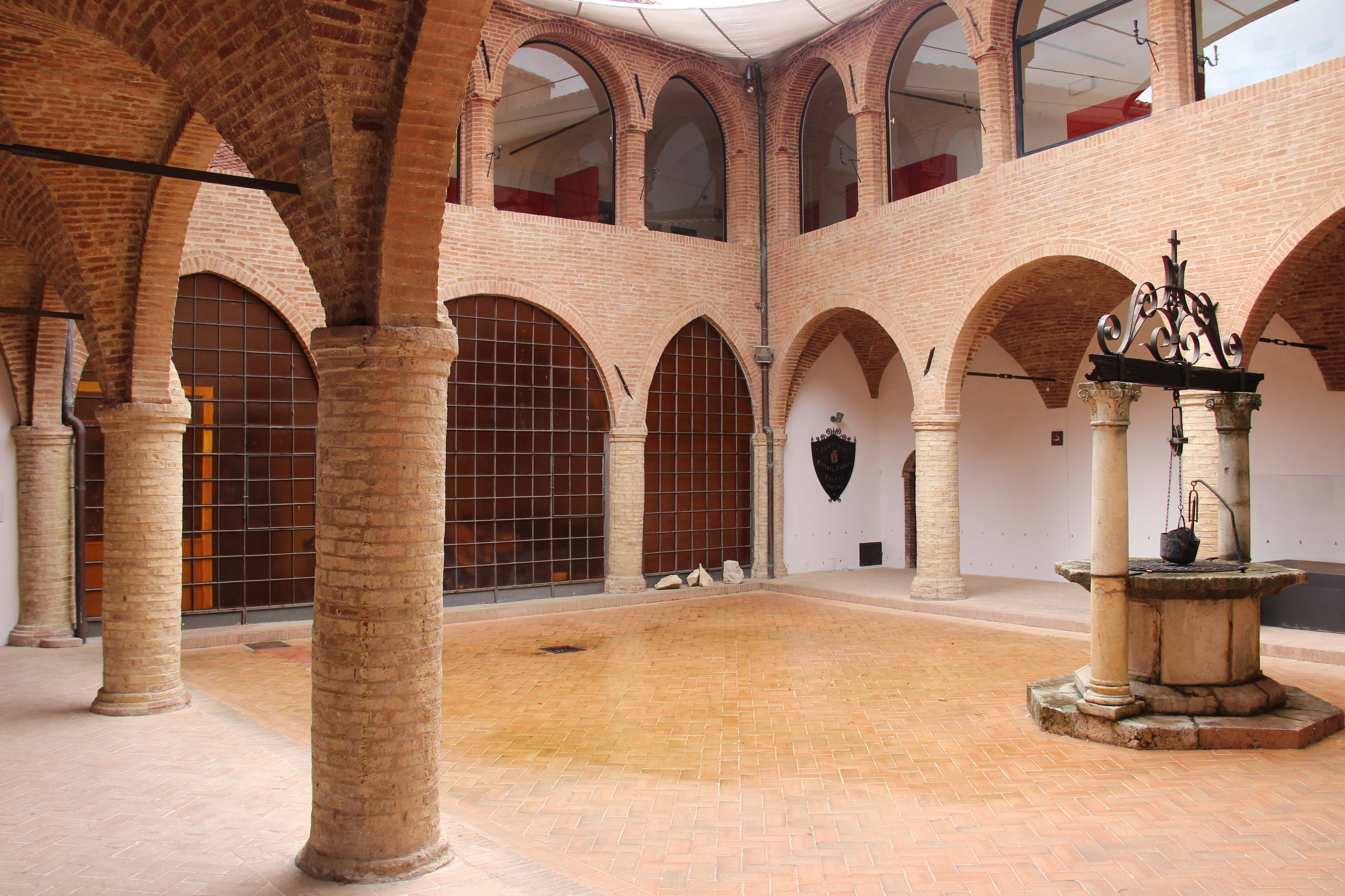 Spedale Santa Maria del Buon Gesù - Pinacoteca civica Bruno Molajoli (esterni e chiostro interno) This is a photo of a monument which is part of cultural heritage of Italy.